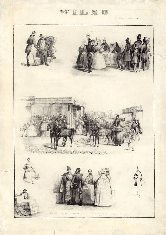 “Арласіяда” Казіміра Бахматовіча